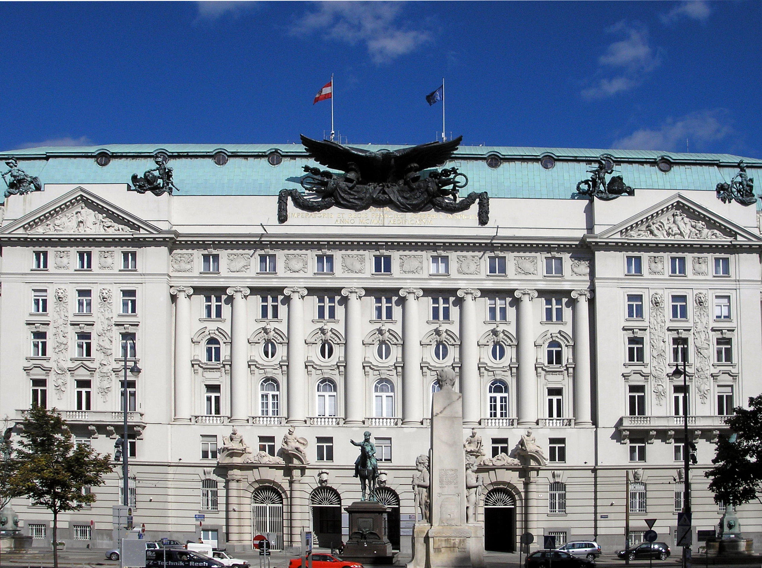 The Regierungsgebäude in Vienna, the former Imperial and Royal Ministry of War (Kriegsministerium).